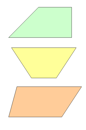 Trapezium.